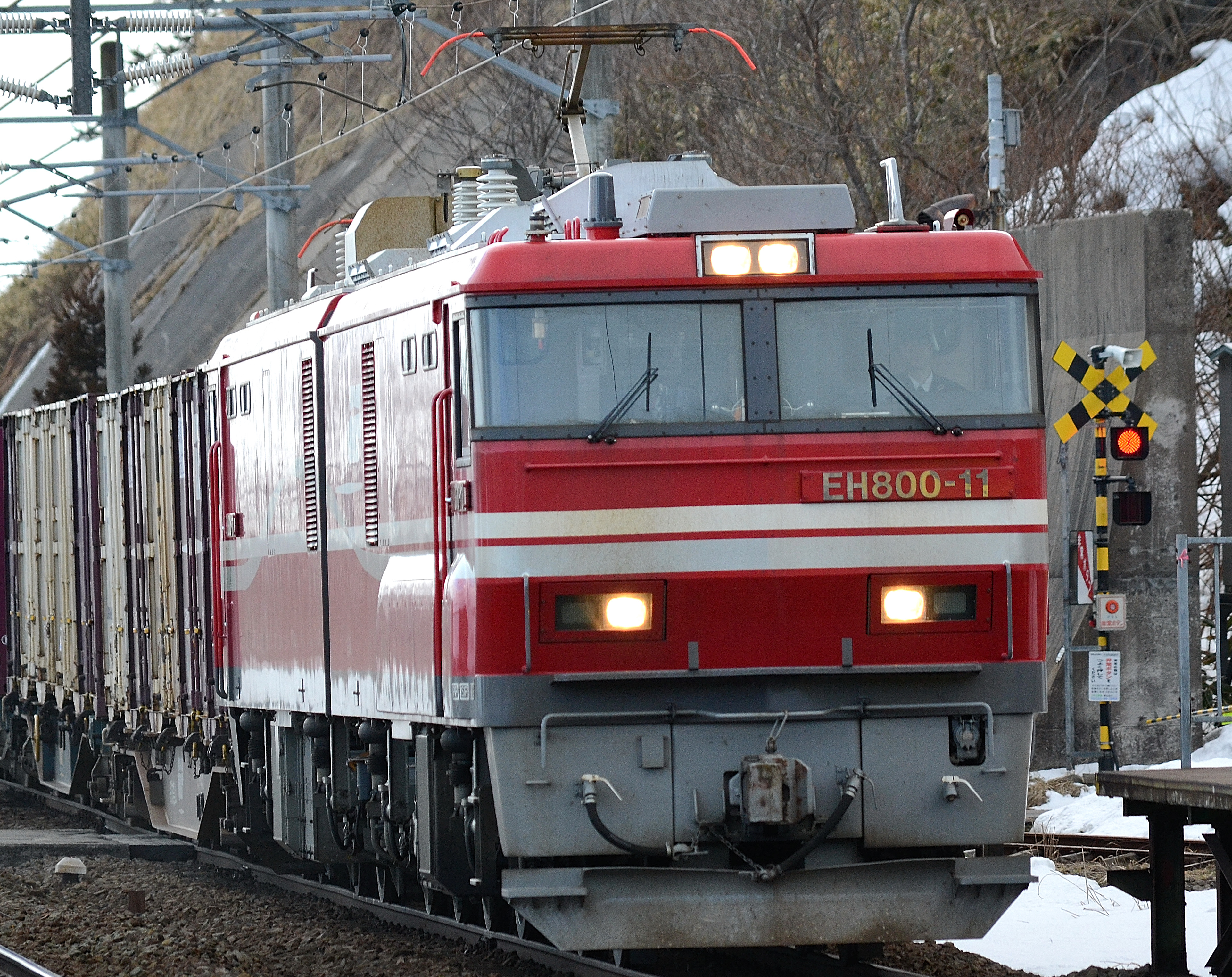 江差線、渡島当別駅を通過するEH800交流電気機関車